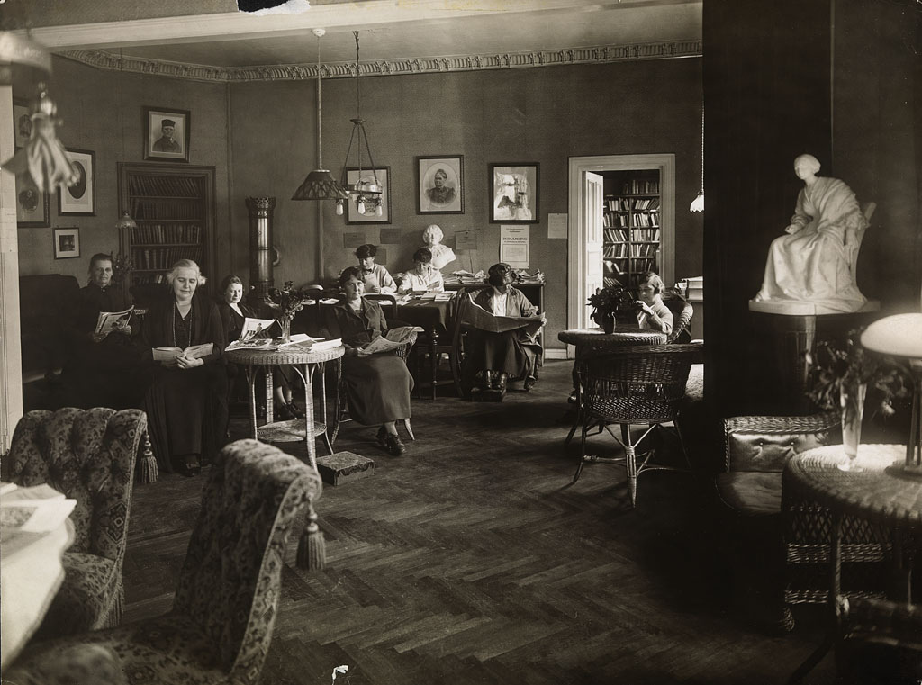 Kristiania Læseforening for Kvinder sin lesesal i Parkveien 62